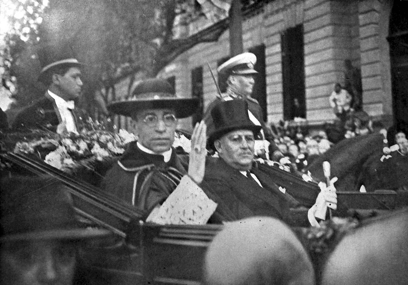 Eugenio Pacelli junto al presidente Argentino